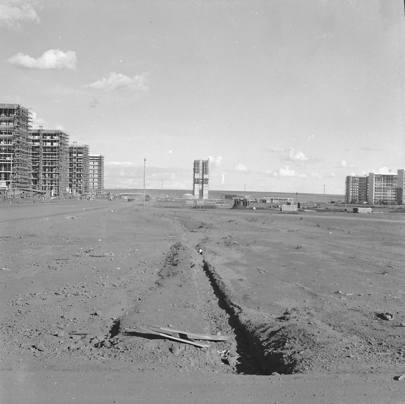 Obras da Esplanada dos Ministérios e do Cogresso Nacional